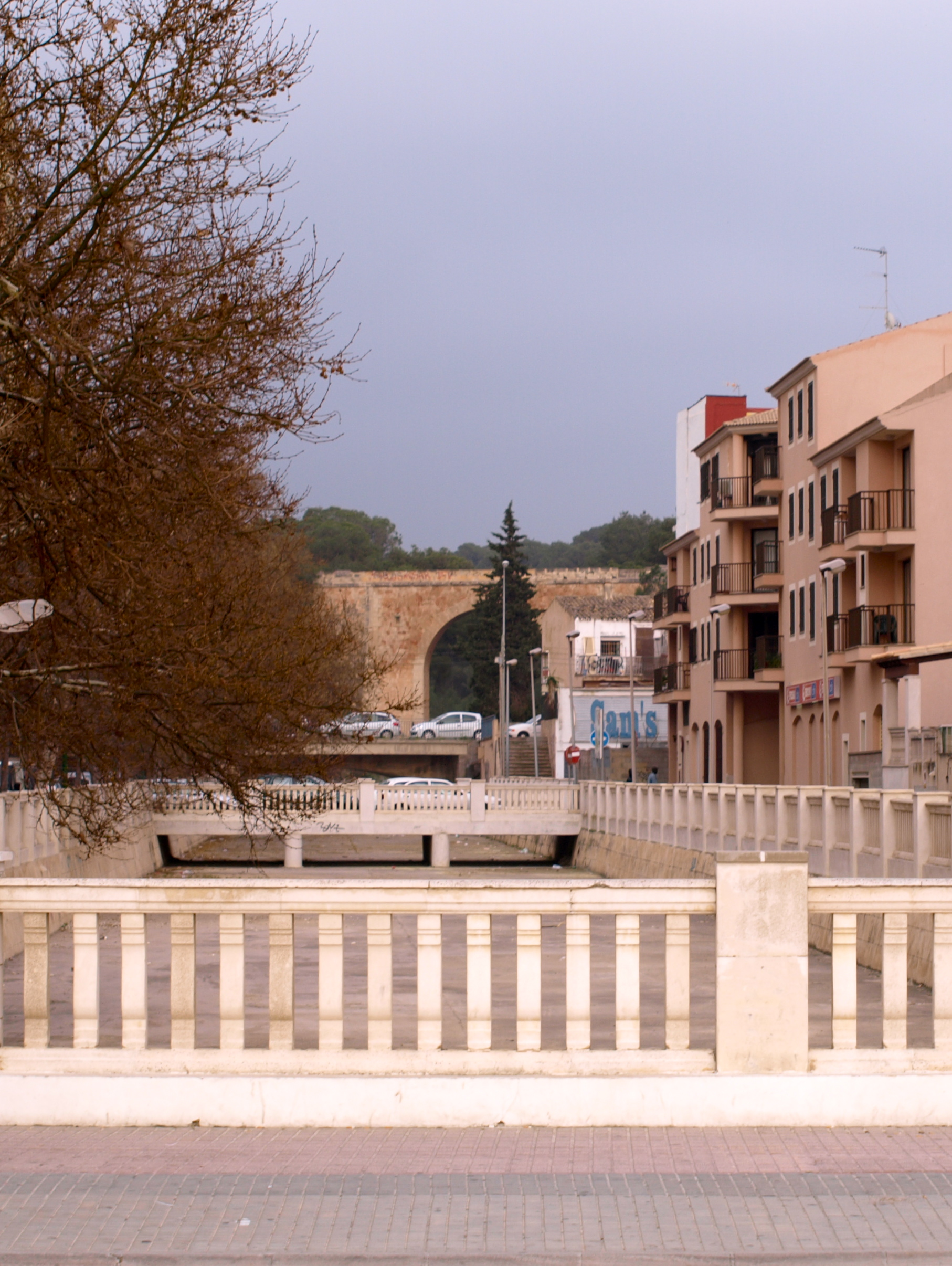 Torrent dels Jueus i Pont del tren de Santanyí